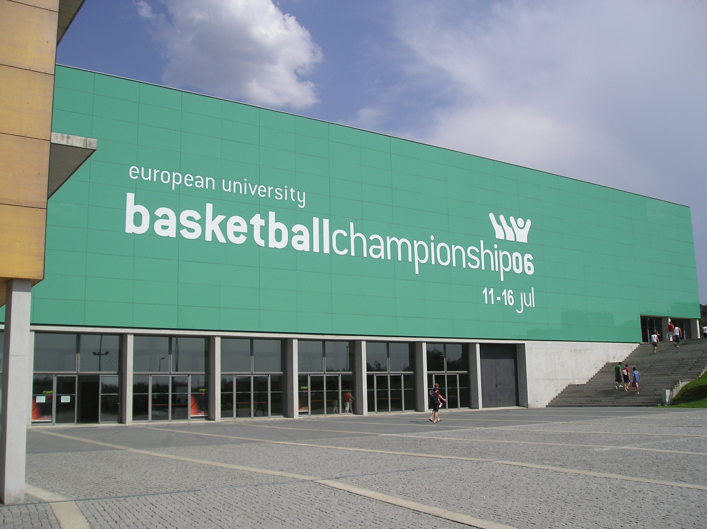 Sportscomplex Multiusos in Guimarães (Portugal)